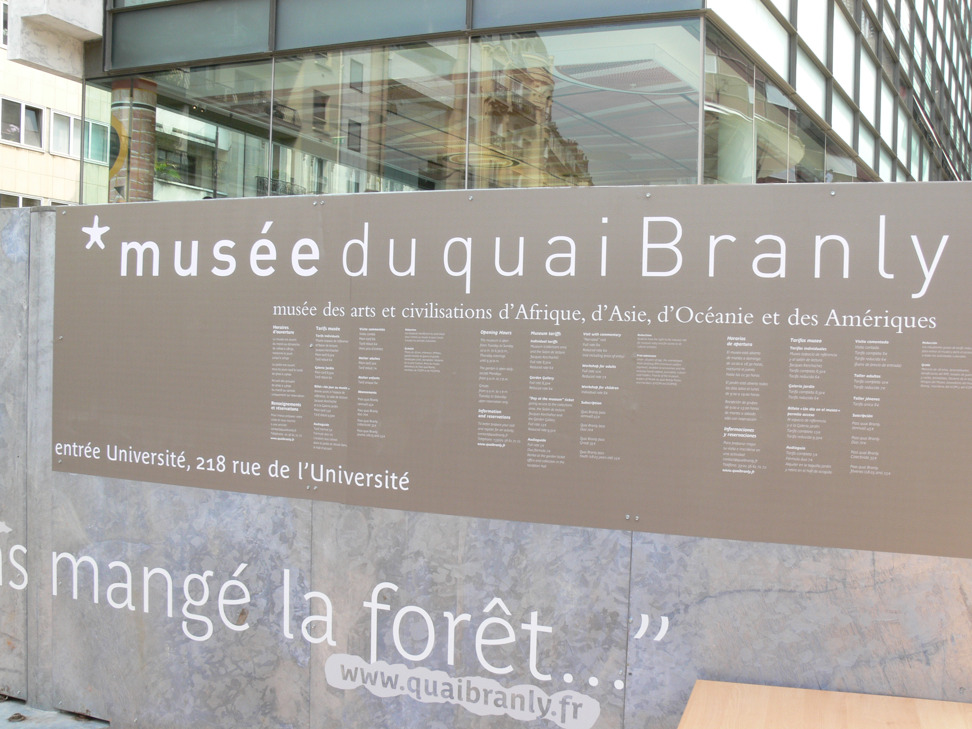 Musée du quai Branly, Paris